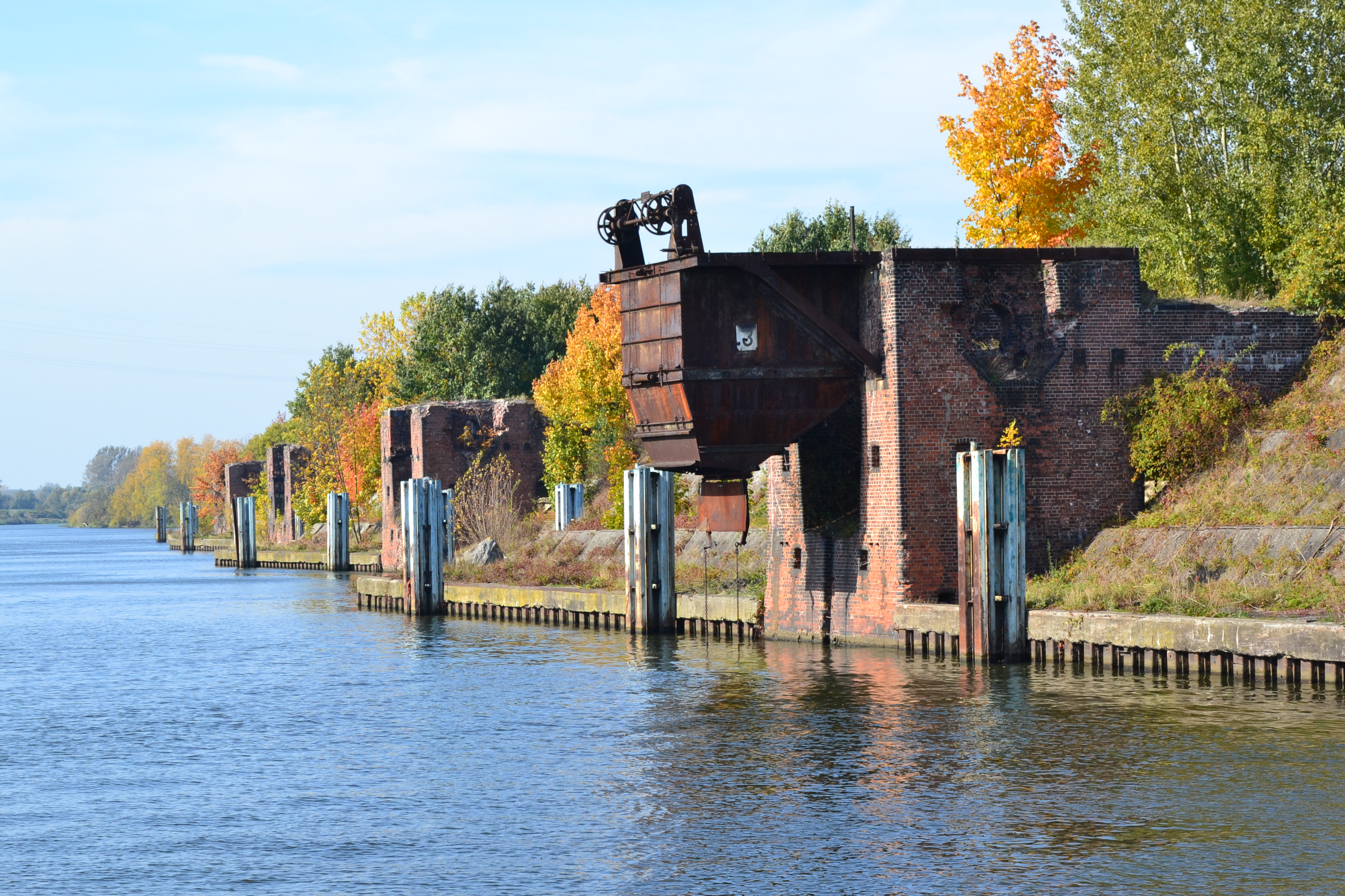 Fragment nabrzeży opuszczonego basenu portowego w Kędzierzynie-Koźlu